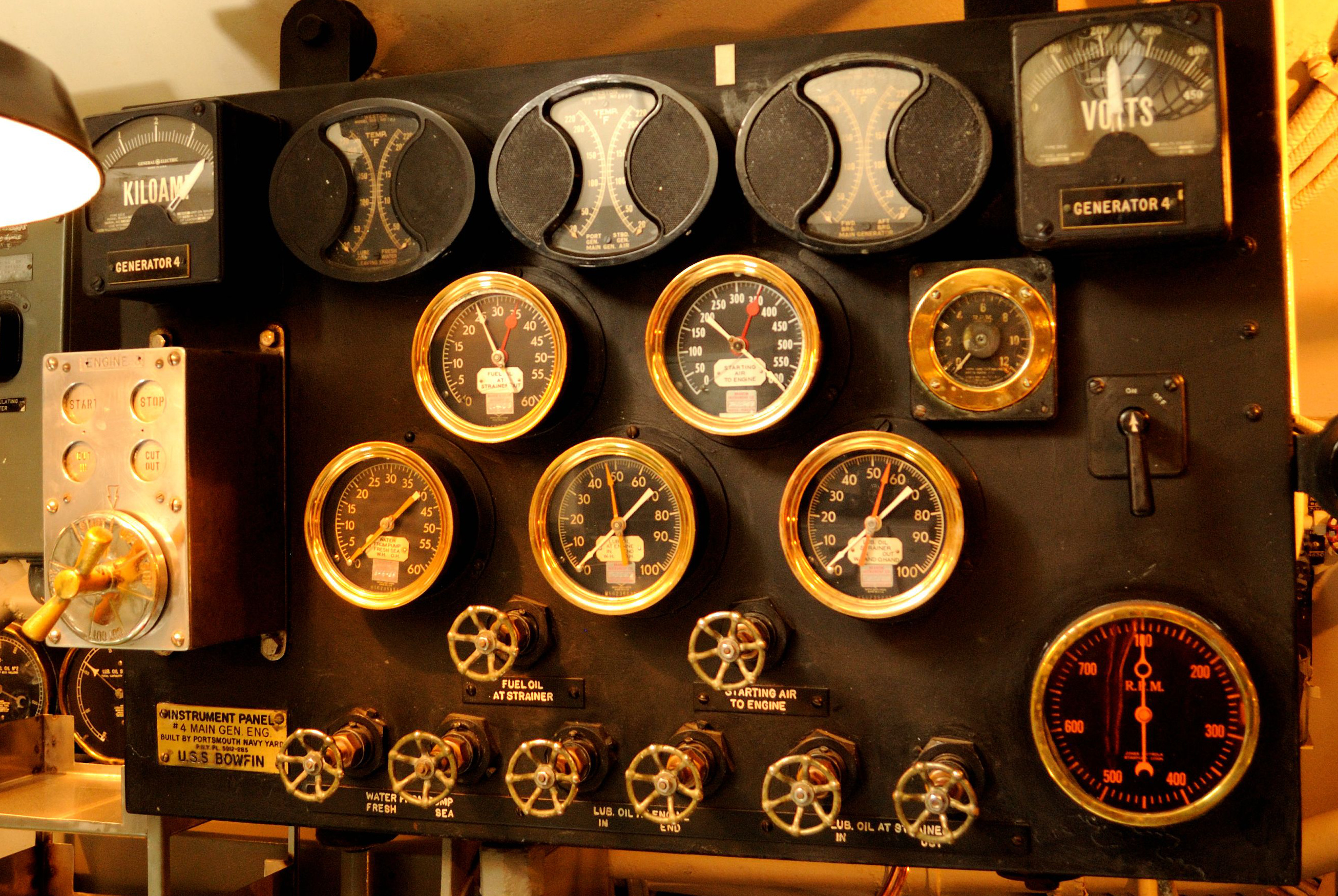 USS Bowfin - Instrument Panel #3 Main Generator Engine